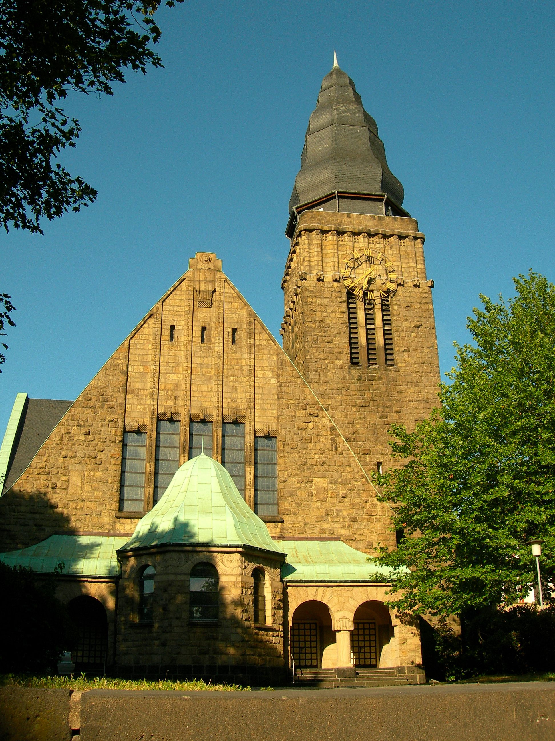 Christuskirche, Velbert-Mitte, Germany